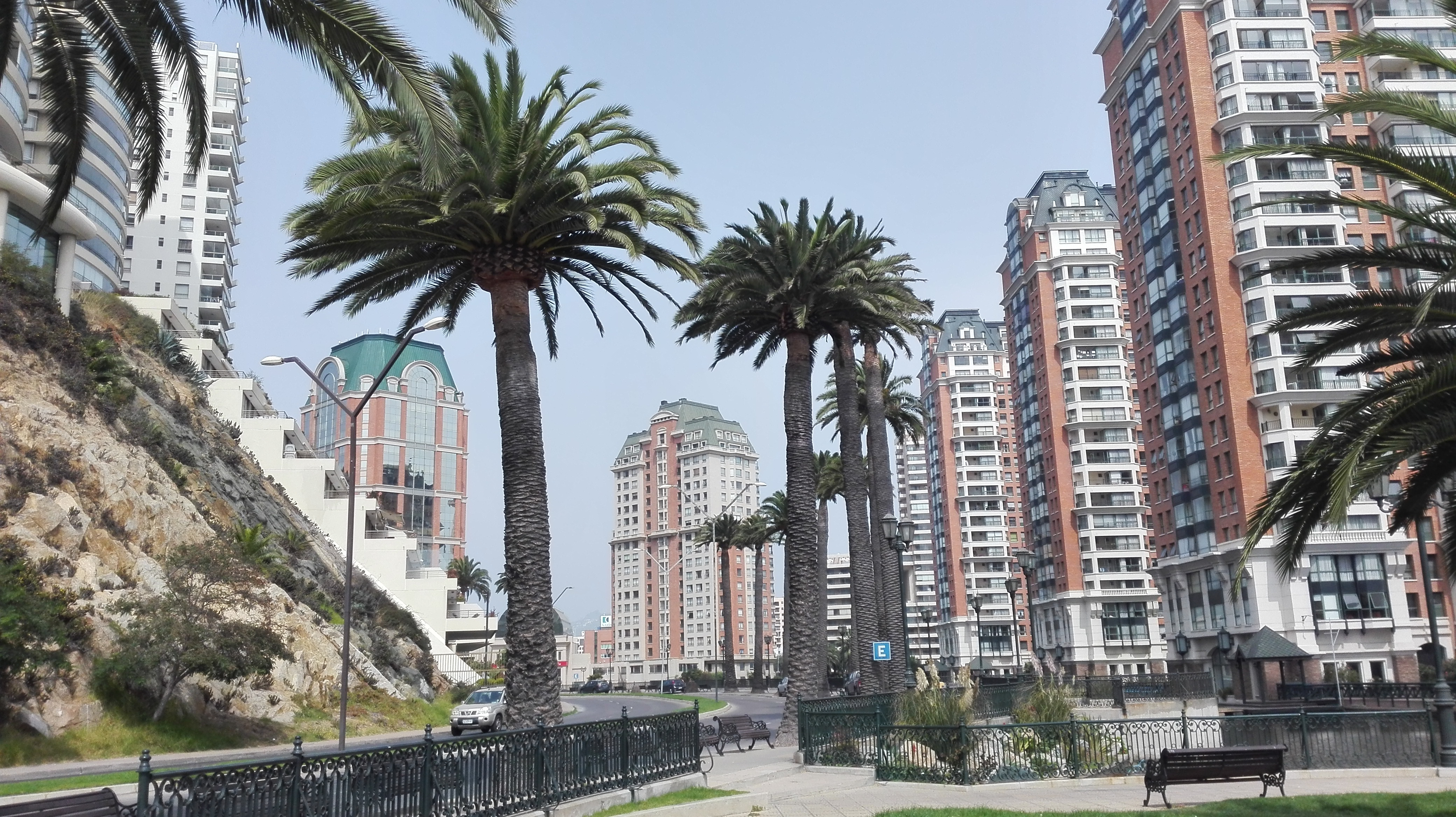 vista edificios